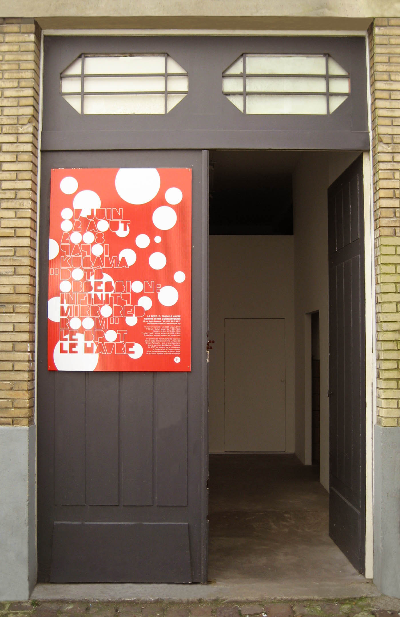 Entrée du Spot